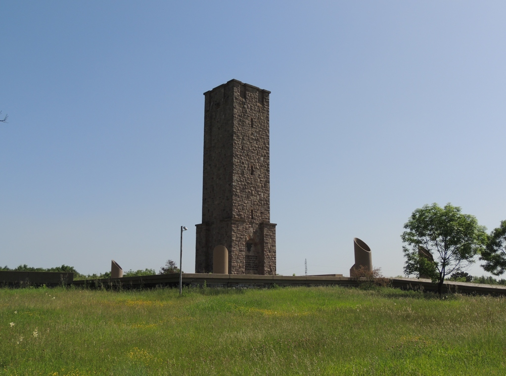 Monumenti Memorial i Gazimestanit